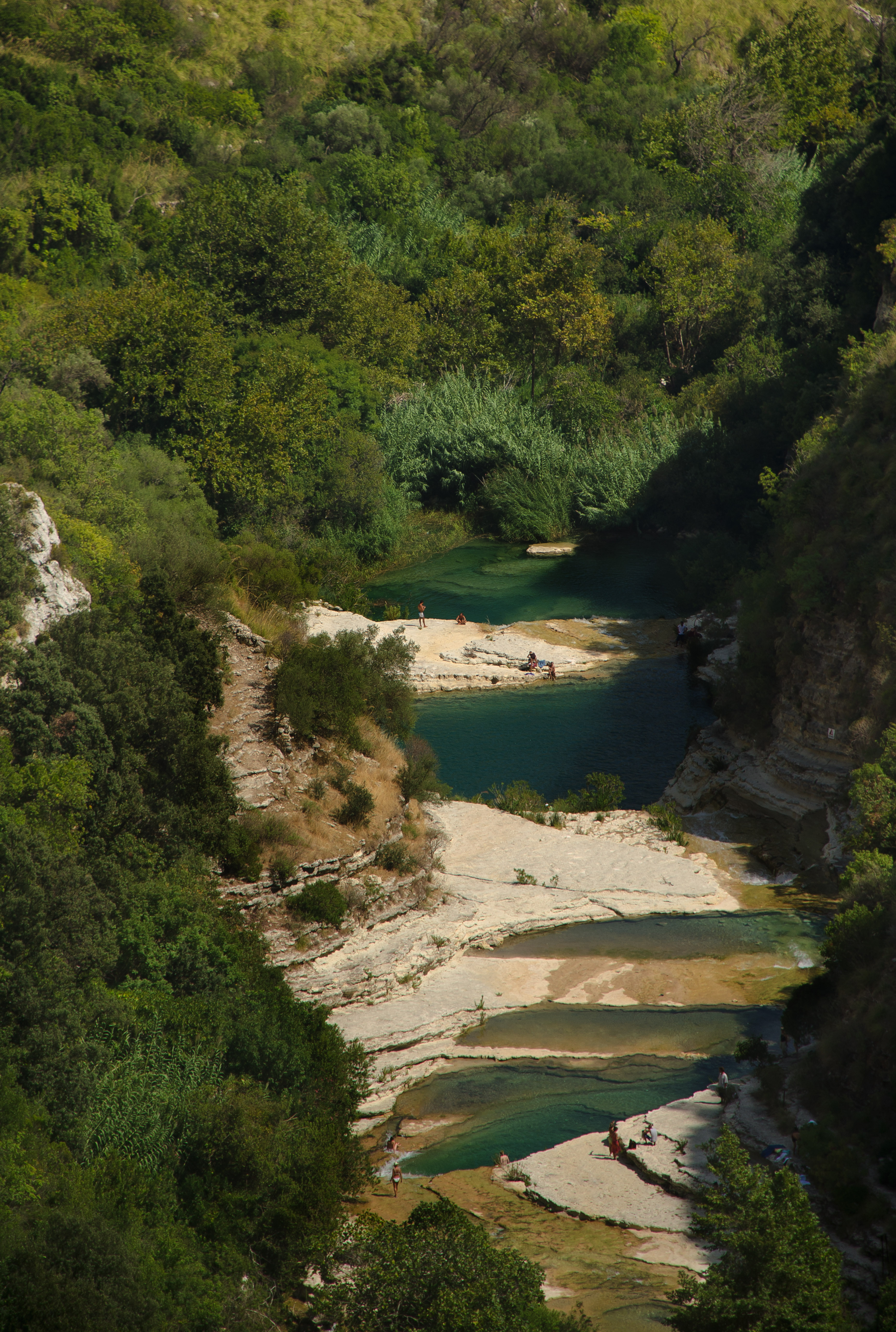 Cavagrande del Cassibile, near Noto, Sicily